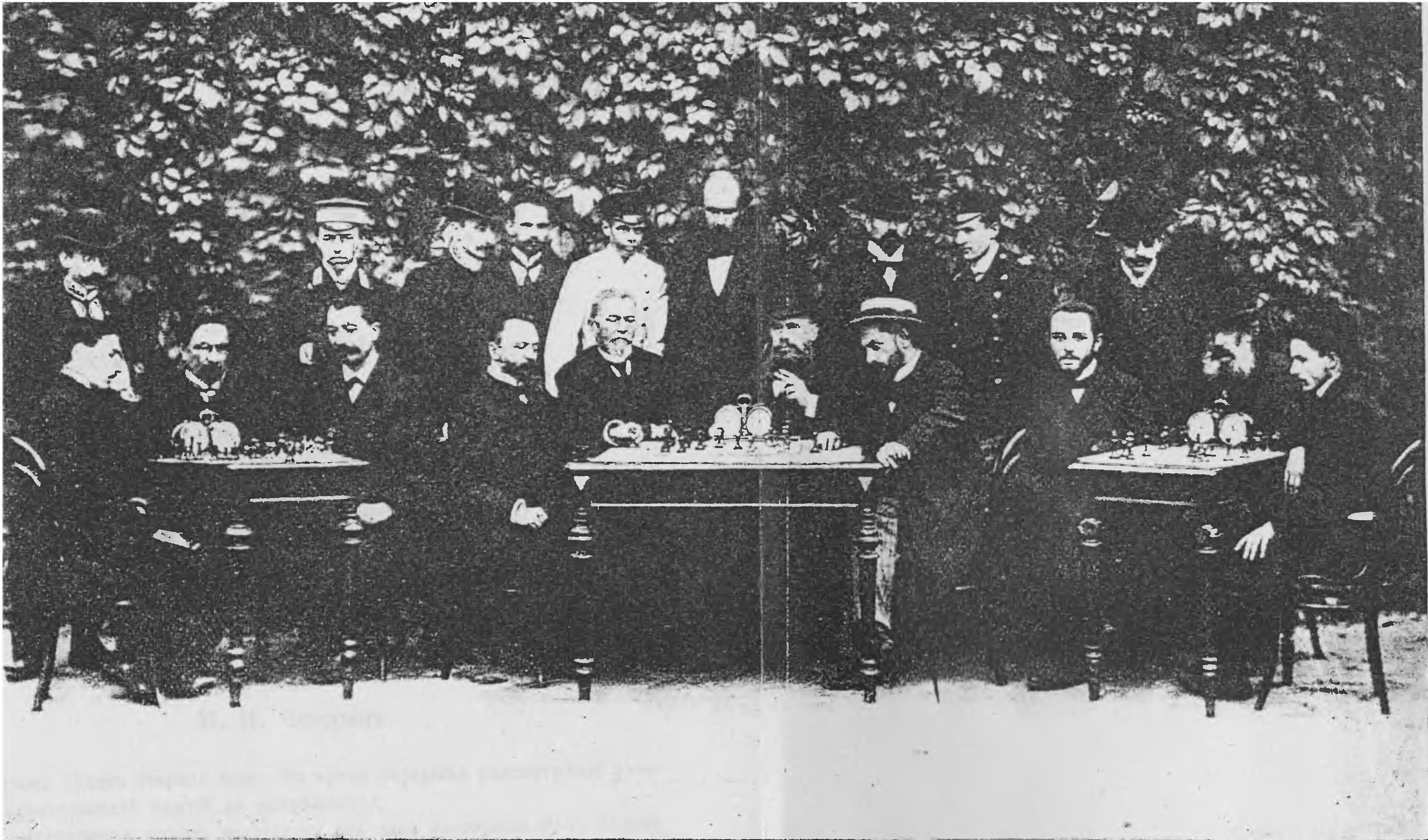 Всероссийский турнир 1903